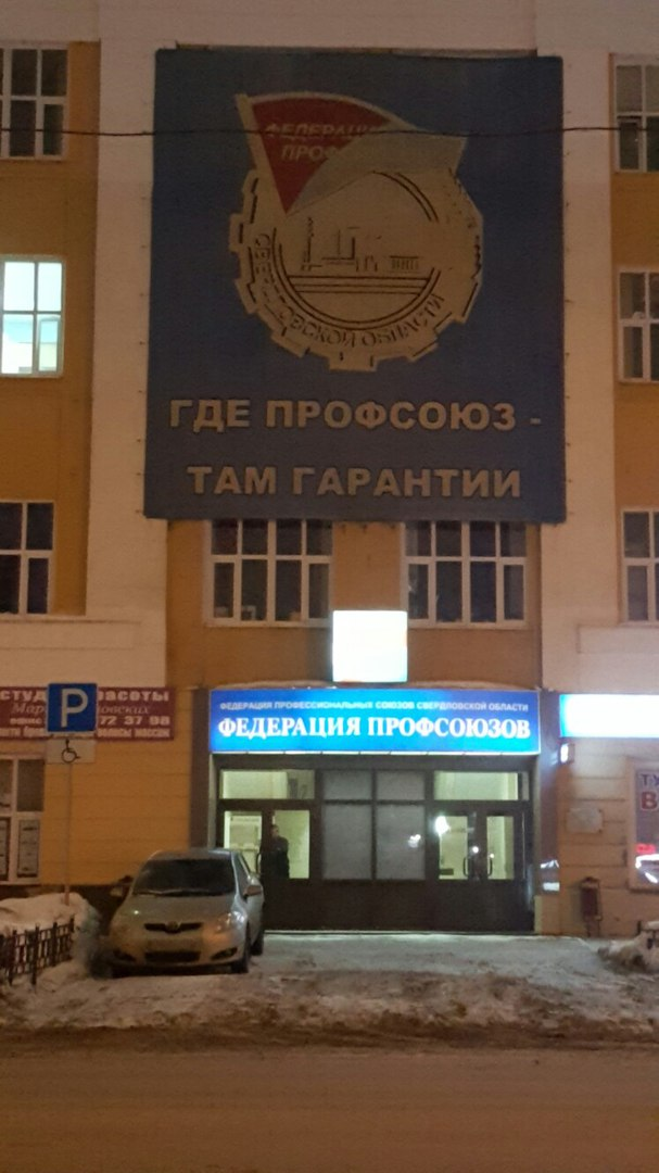 Вход в здание Федерации профсоюзов Свердловской области